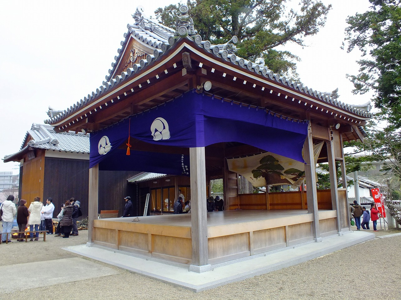 御坂神社能舞台